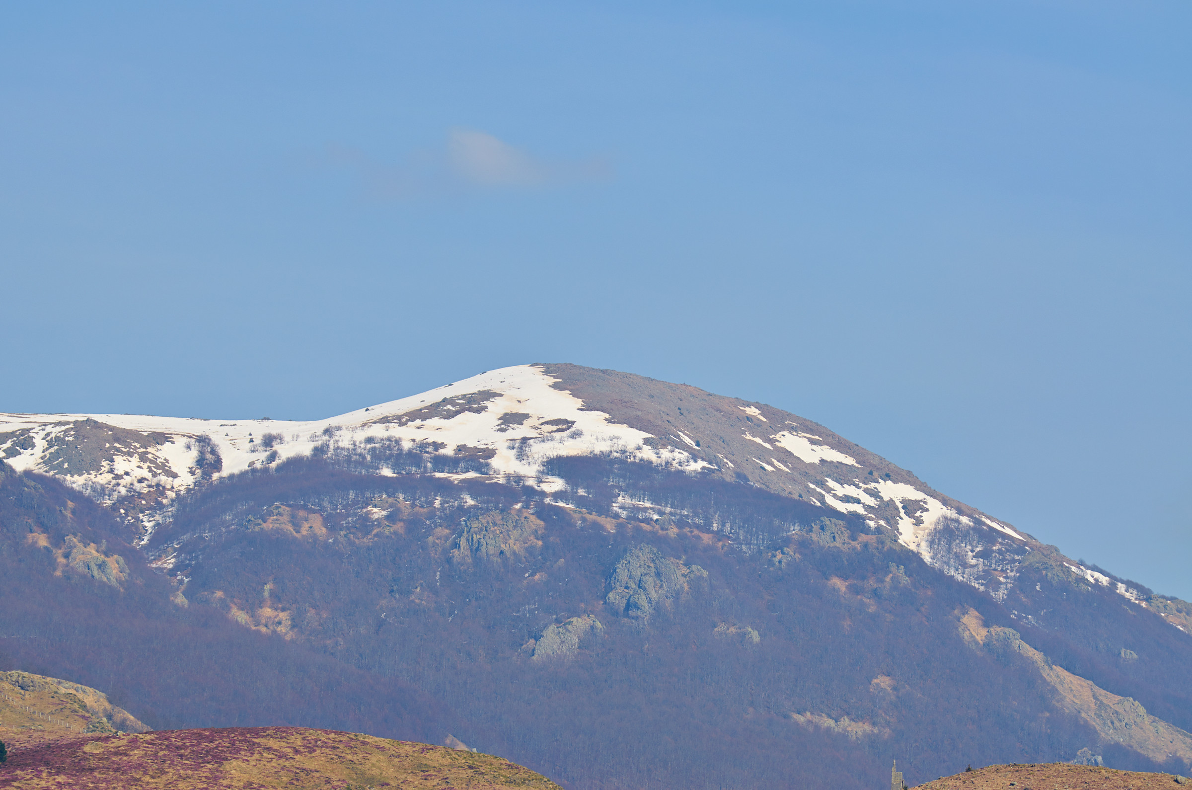 Aiona (telefoto)